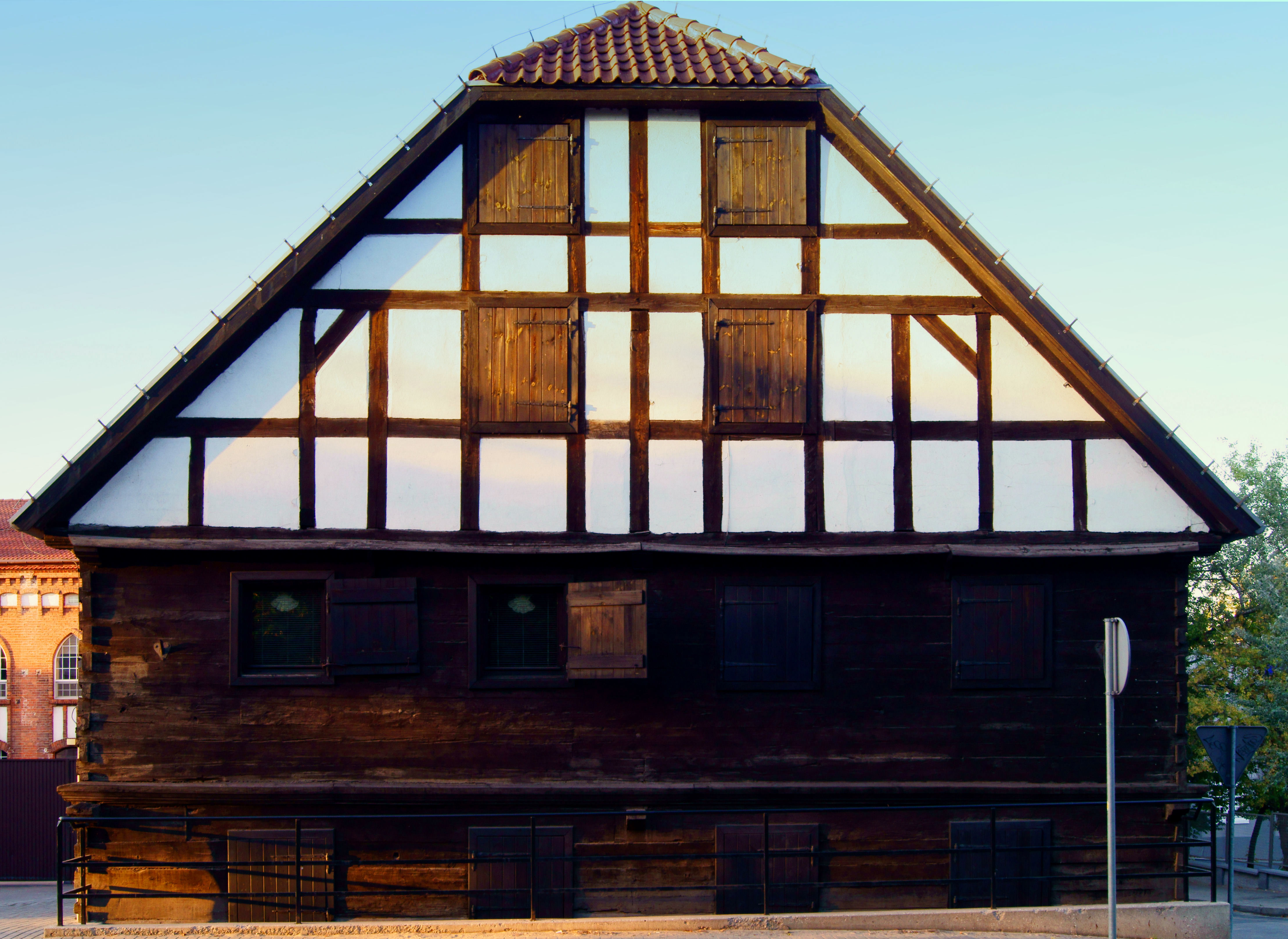 „czarny spichrz”, drewn., 1 poł. XIX , Włocławek, ul. Prymasa Wyszyńskiego 12 (d. Toruńska 2), miasto Włocławek